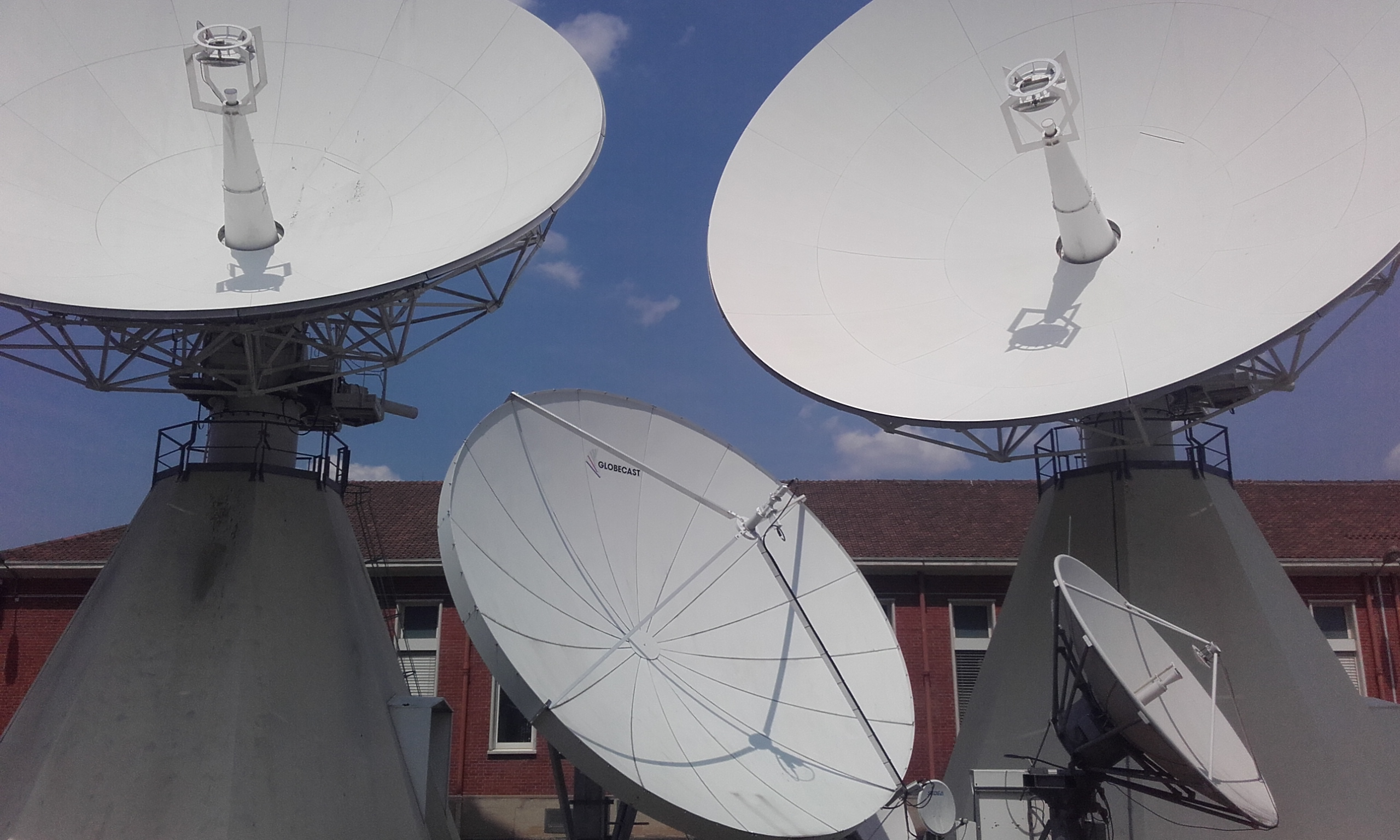 Quelques antennes paraboliques d'émission vers les satellites géostationnaires de télécommunication sur le téléport de Sainte-Assise, au sud de la région parisienne.